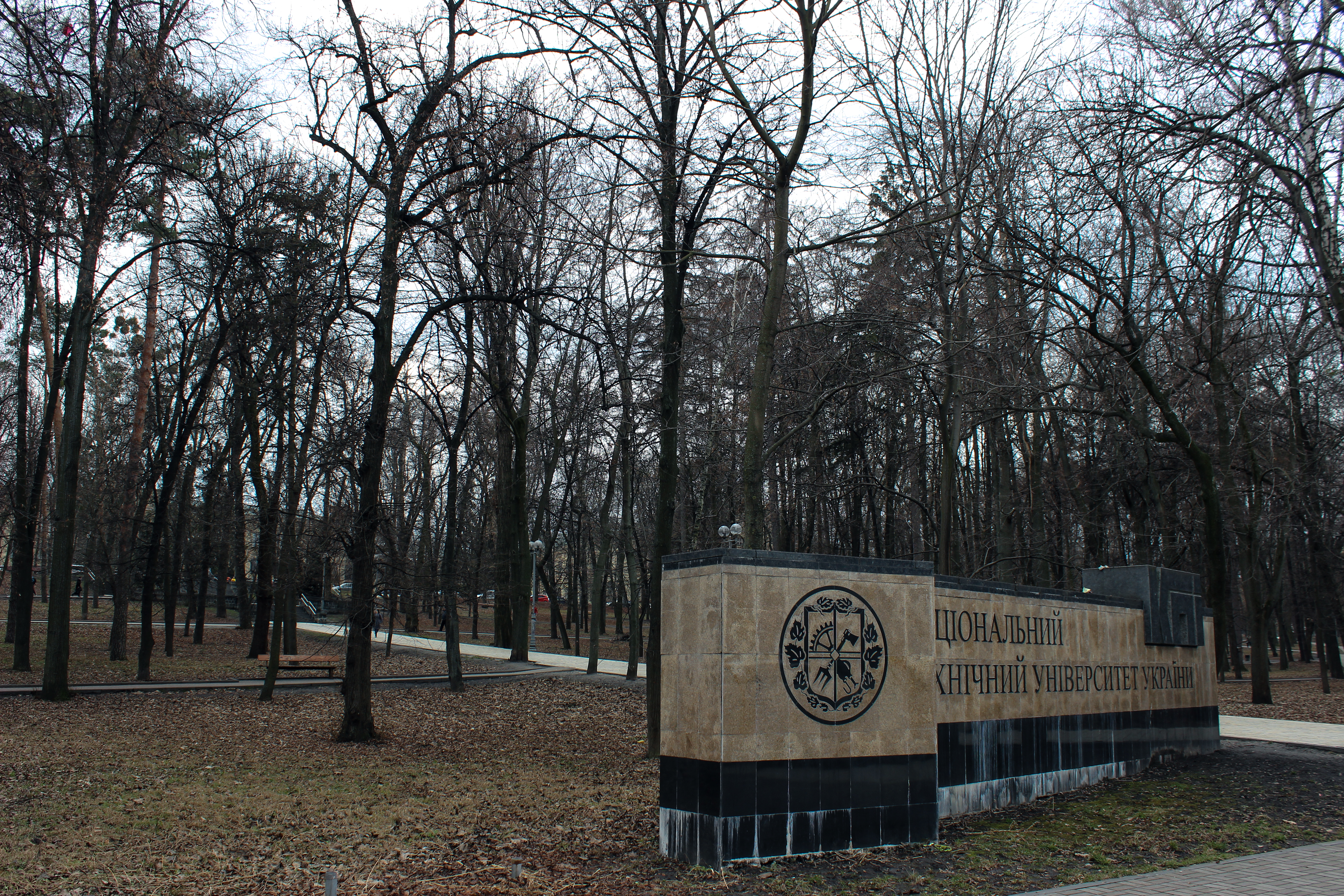 Парк КПІ, Київ, Перемоги просп., 37